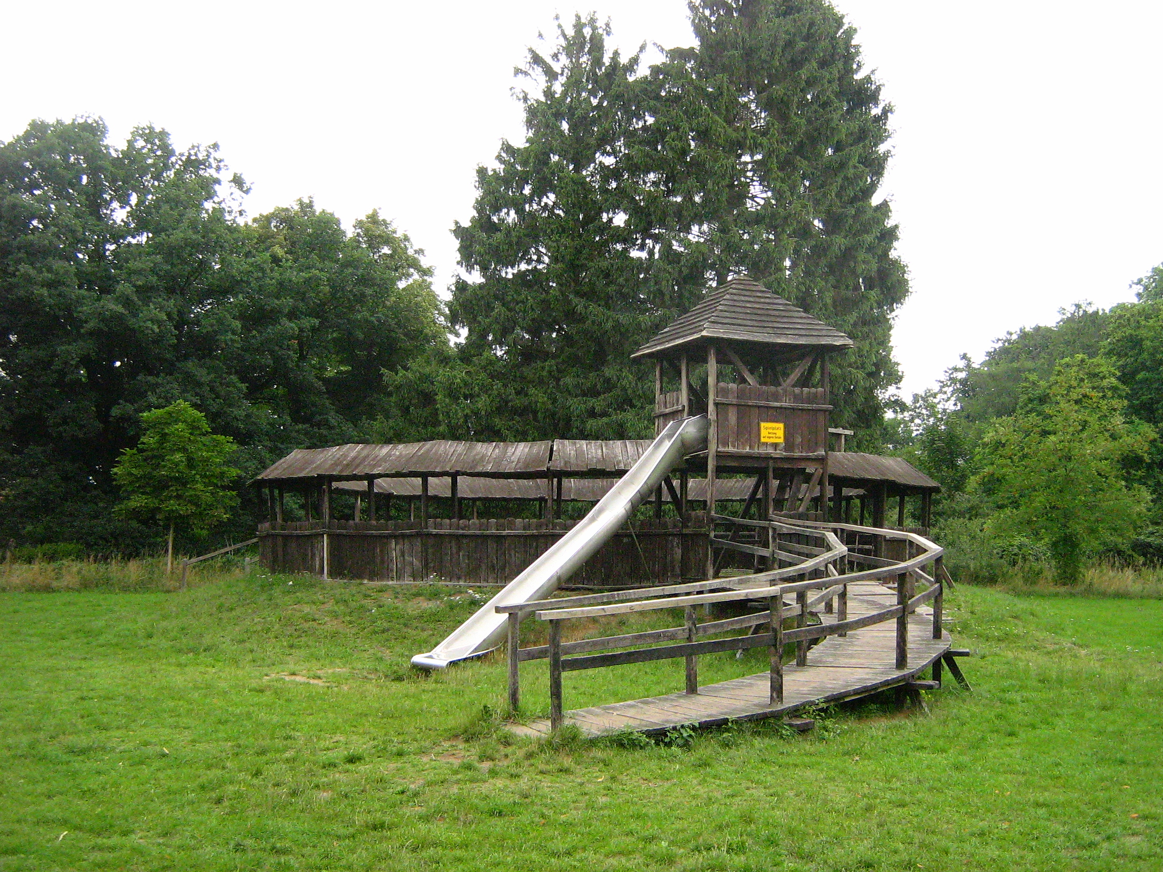 Spielplatz im Bereich der Vorburg der slawischen Burganlage auf der Burgwallinsel im Teterower See (Landkreis Güstrow, Mecklenburg).